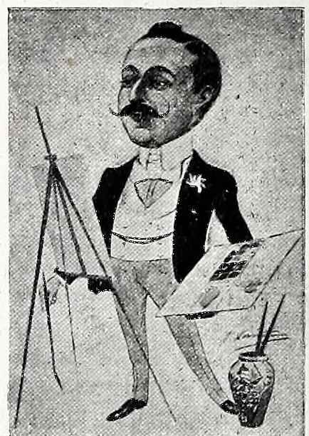 Plantilla de Blanco y Negro.